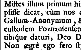 Imię Galla Anonima we wstępie do edycji Kroniki Kadłubka Herburta w 1612 roku.